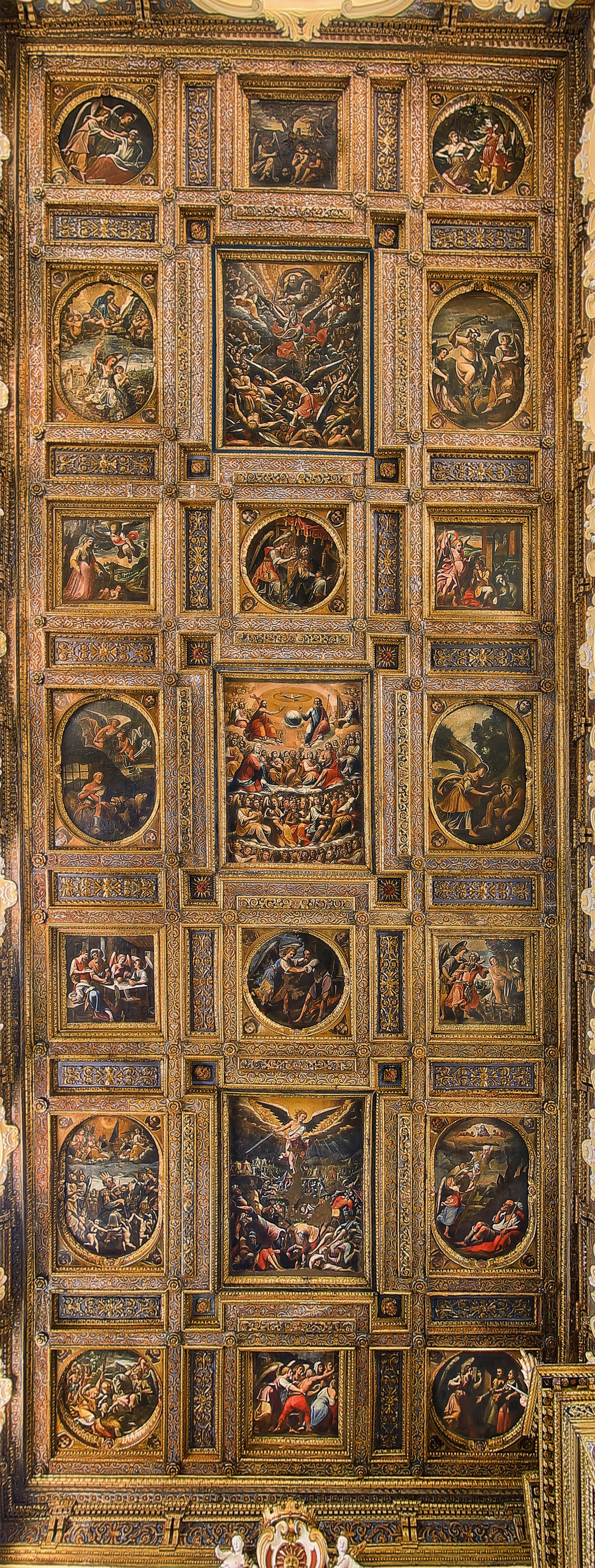 Dipinti della navata centrale di Giovan Tommaso Guarini, Collegiata San Michele Solofra